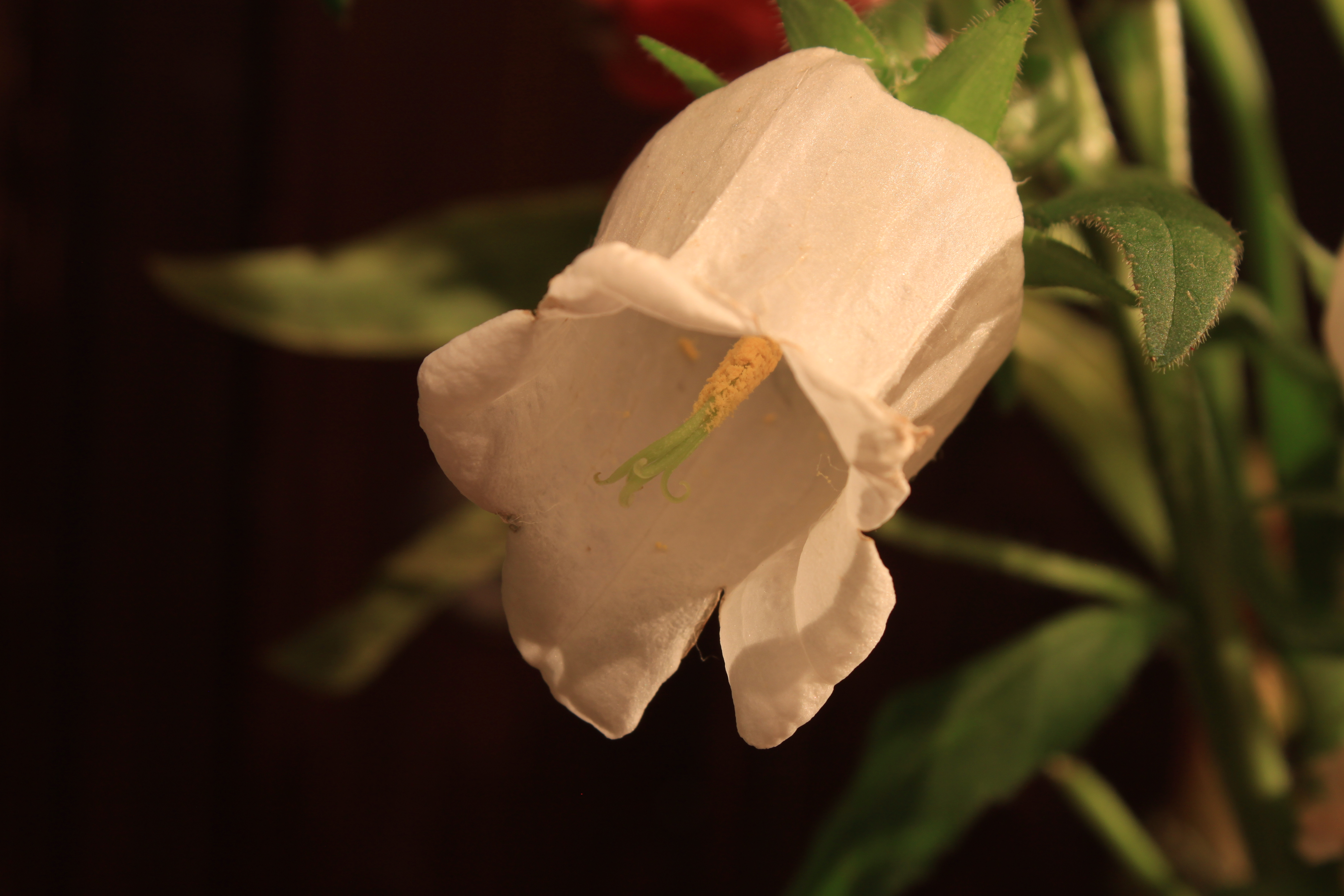 Nahaufnahme der Blüte einer weißen Campanula medium, am Stempel sind die gelben Pollenkörner zu sehen